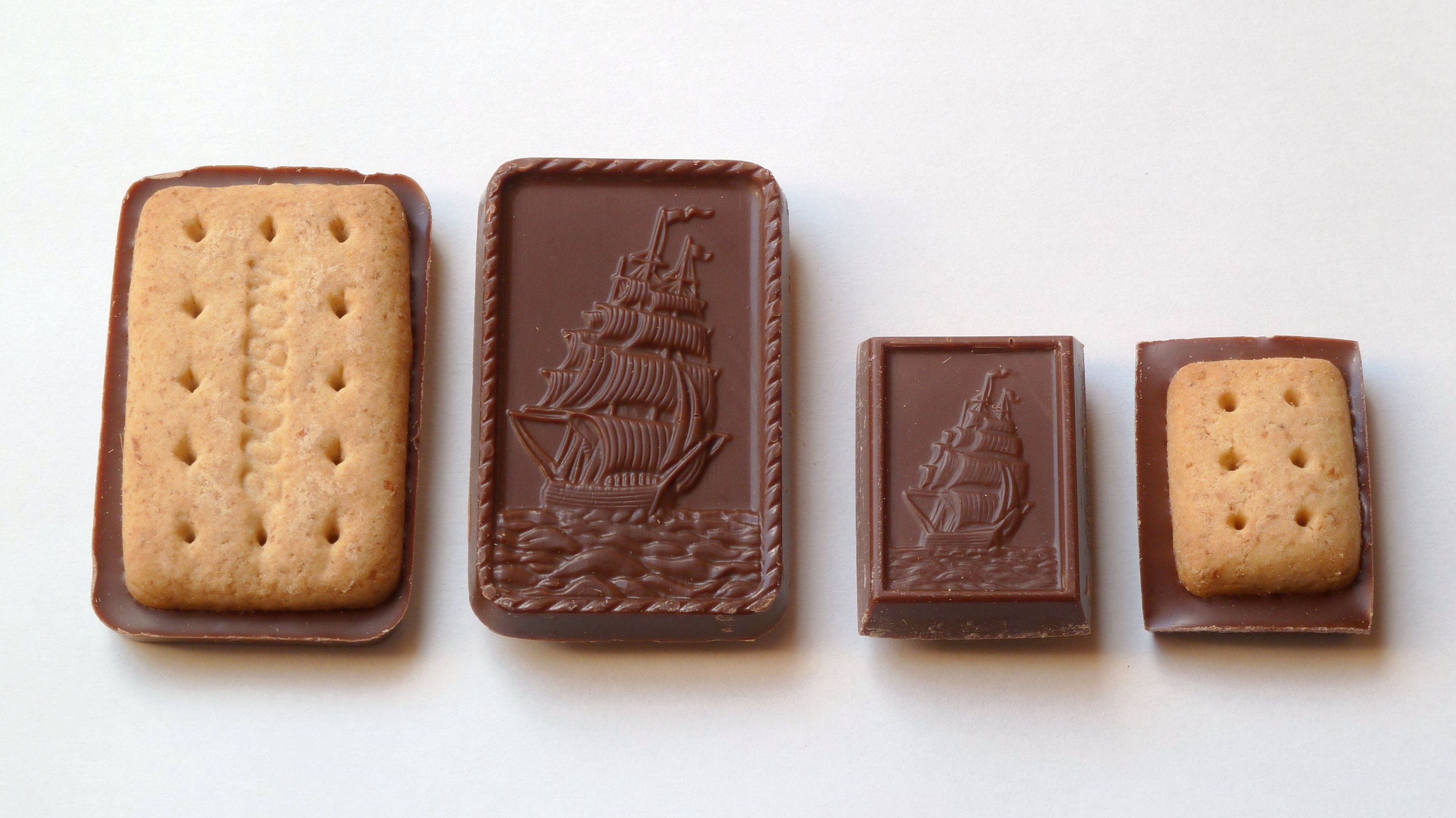 日本の製菓会社・ブルボンが販売している「アルフォート」と「アルフォートミニチョコレート」。共にミルクチョコレート。両端は裏面。